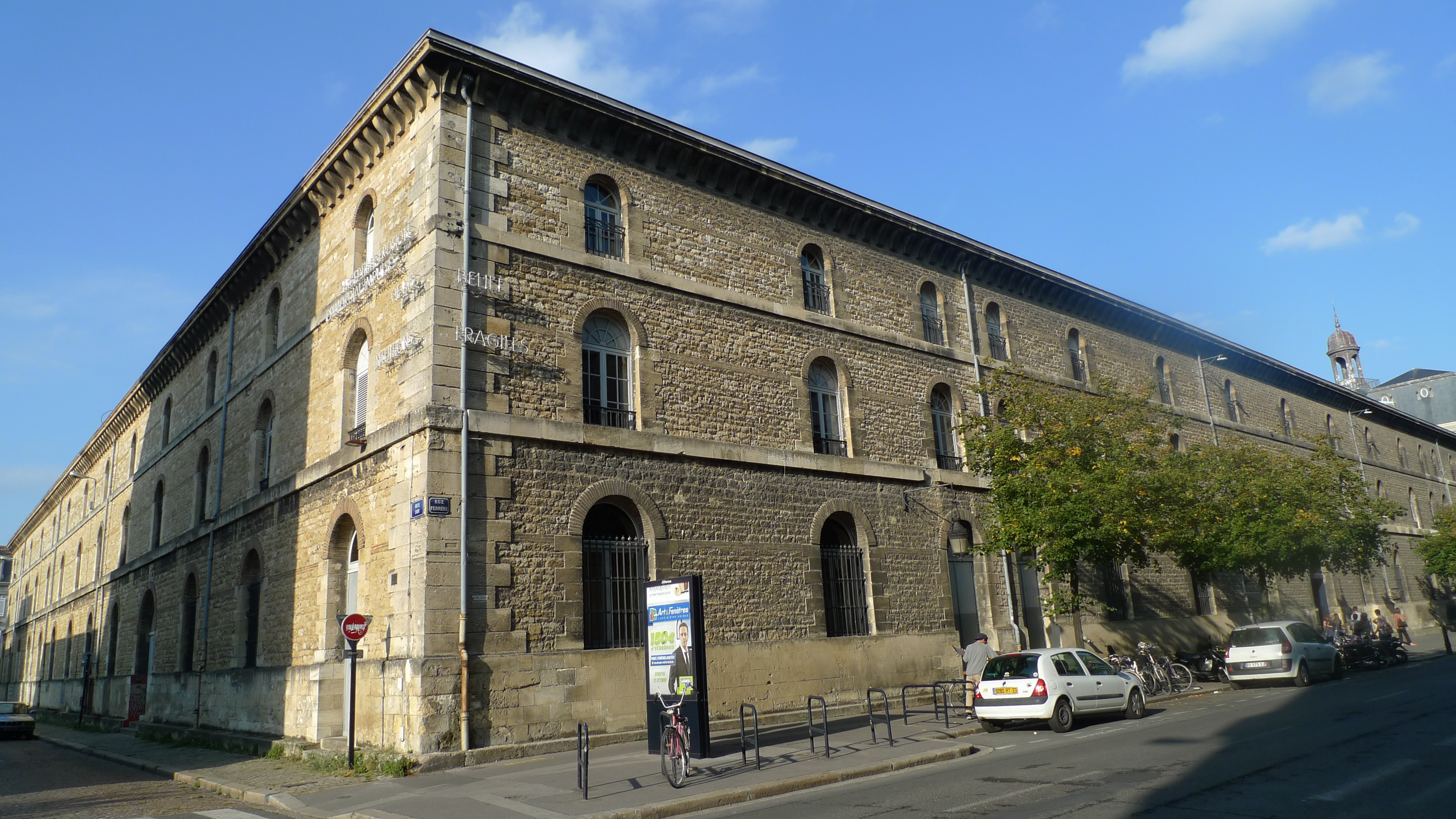 Entrepôt Lainé à Bordeaux